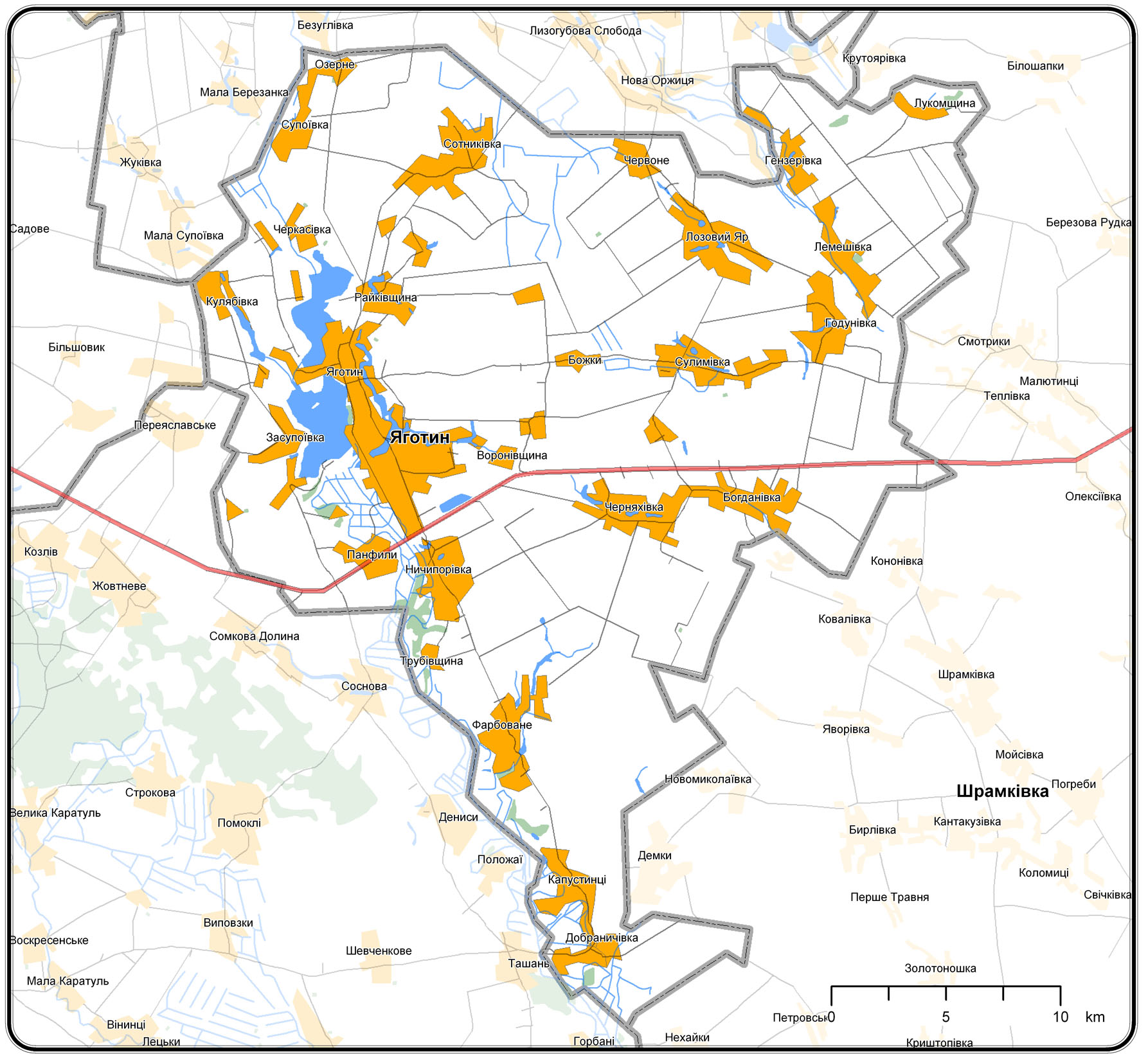 Мапа Яготинського району: Мапа Яготинського району